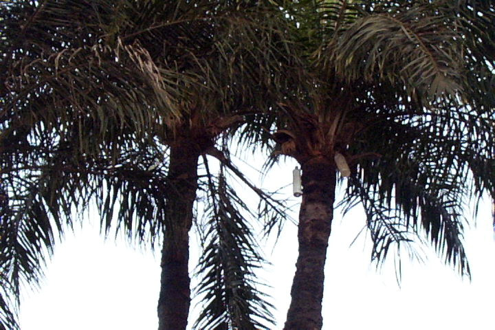 Elaeis guineensis